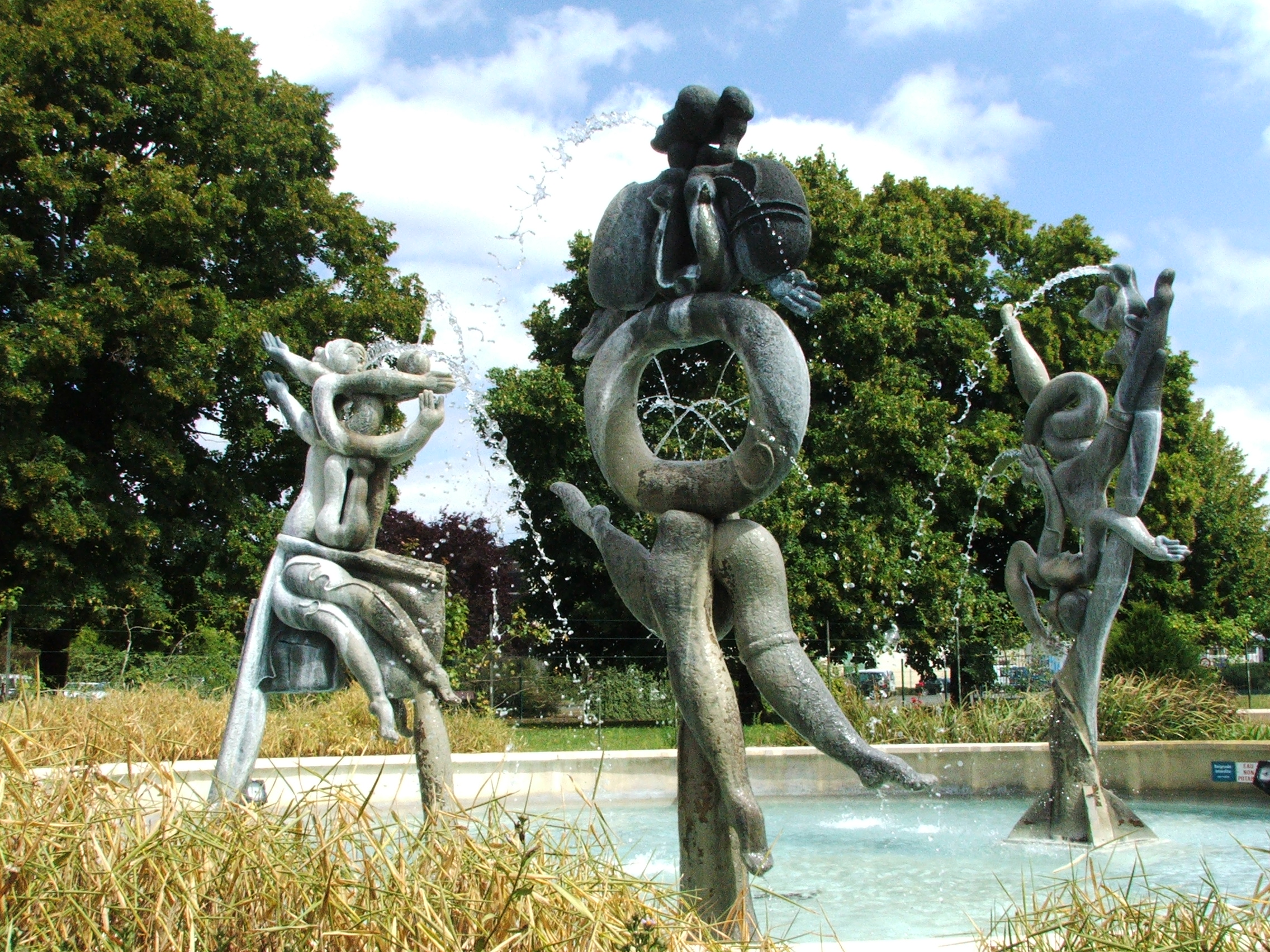 Statues à la maison de l'eau au Mans, ancienne usine hydraulique de la ville.